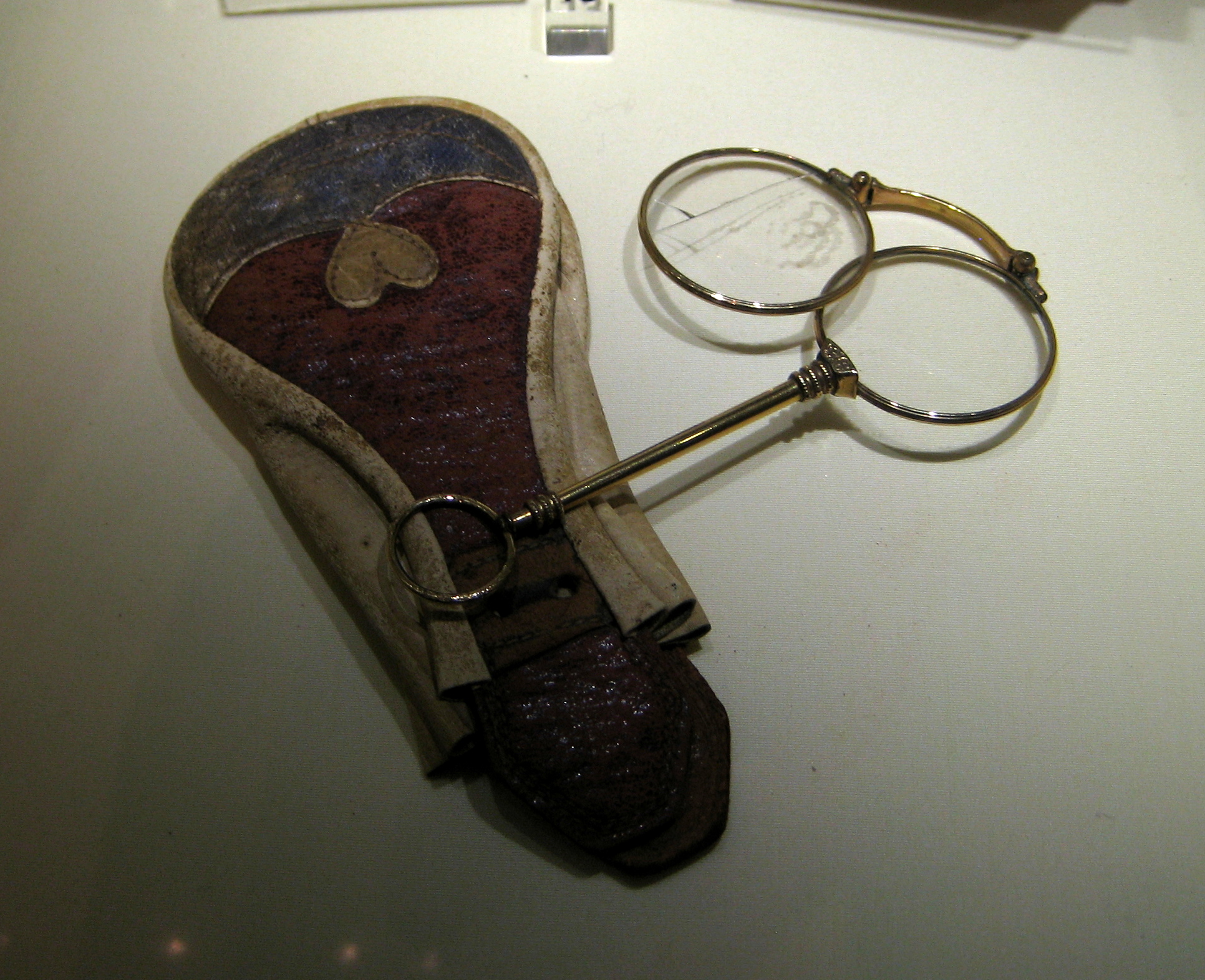 Музей "Бородинская панорама"